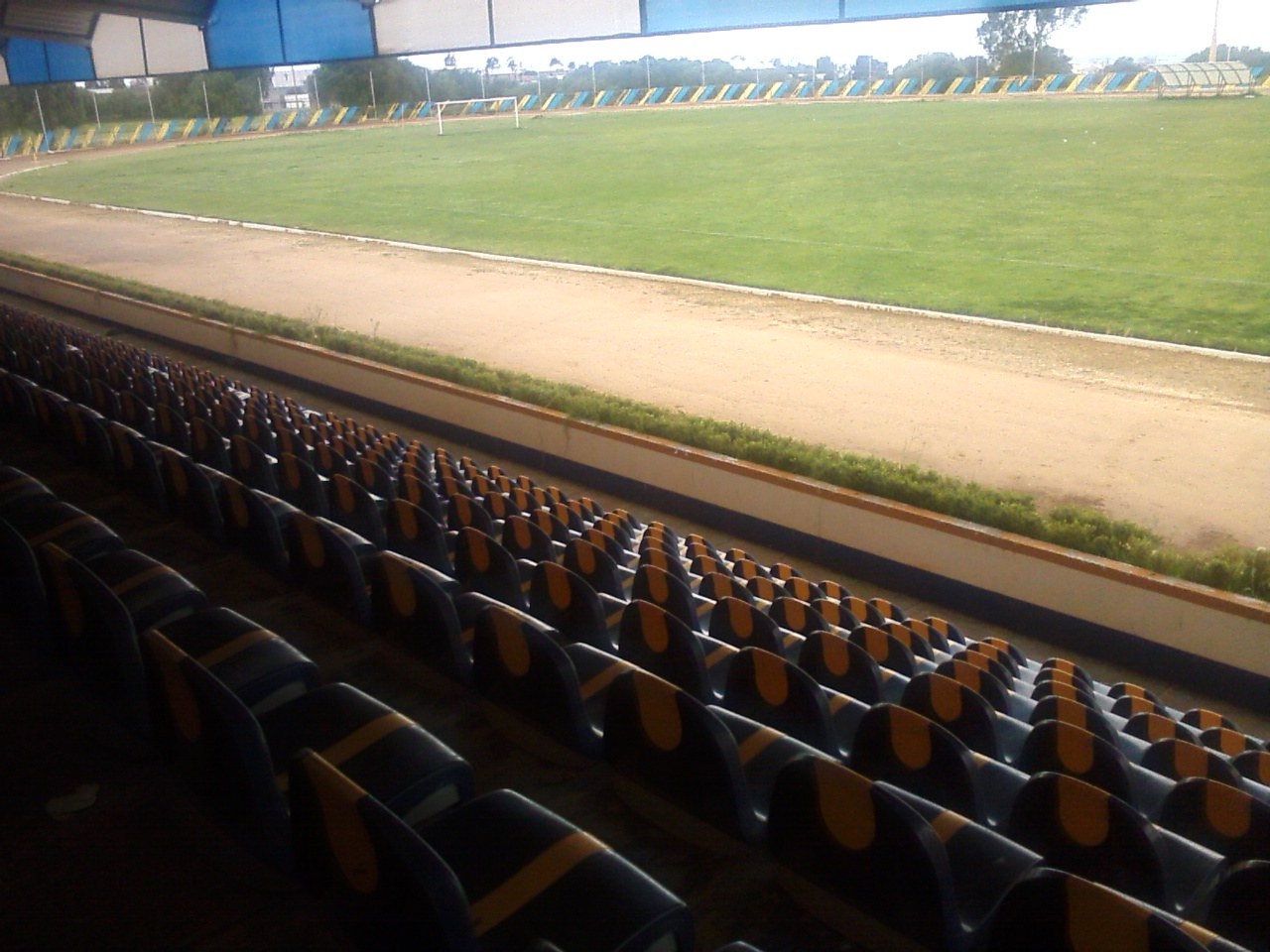 Estadio de la Universidad Autónoma de Zacatecas en la comunidad de La Escondida, municipio de Zacatecas, con capacidad para alrededor de 1000 espectadores.